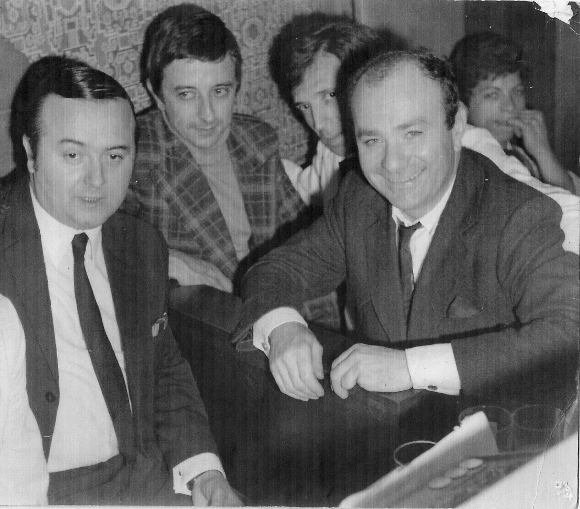 Marcel Rossi (à gauche) et Fernand Raynaud (à droite)